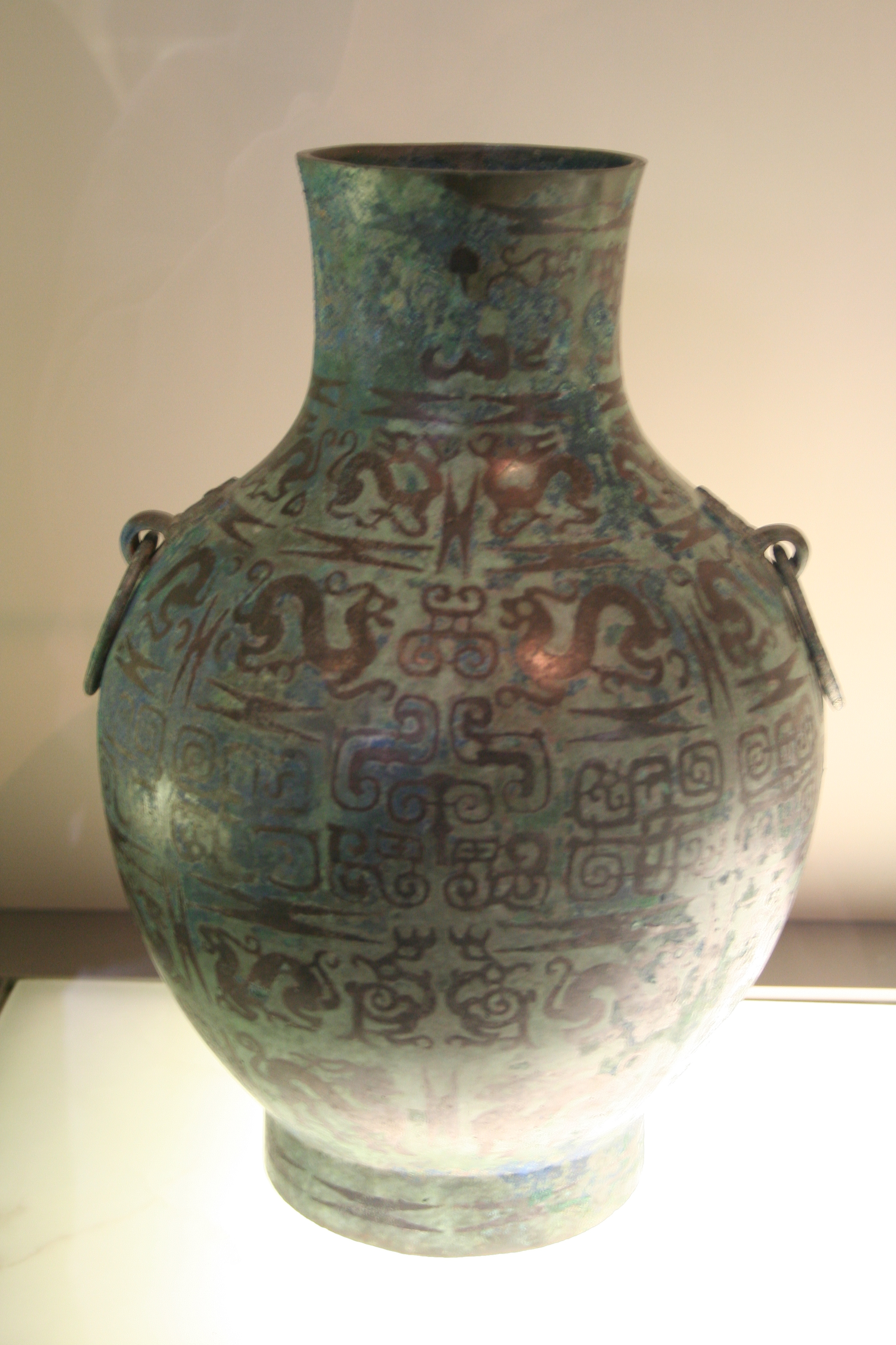 Vase hu pour conserver les boissons fermentées. Bronze avec incrustation de cuivre. H. : 39,8cm. Ve siècle avant notre ère. Début de l'époque des Royaumes Combattants.